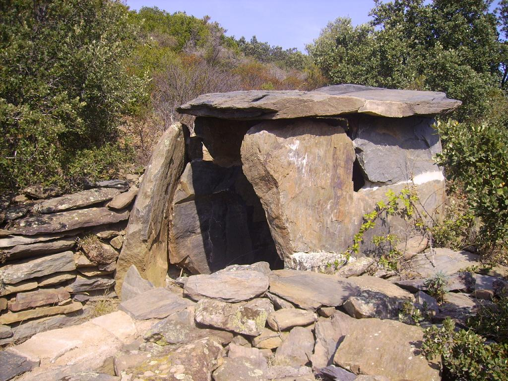 Girarols I